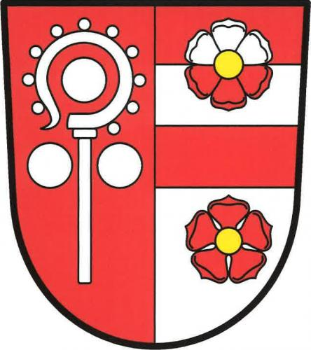 Čečovice znak